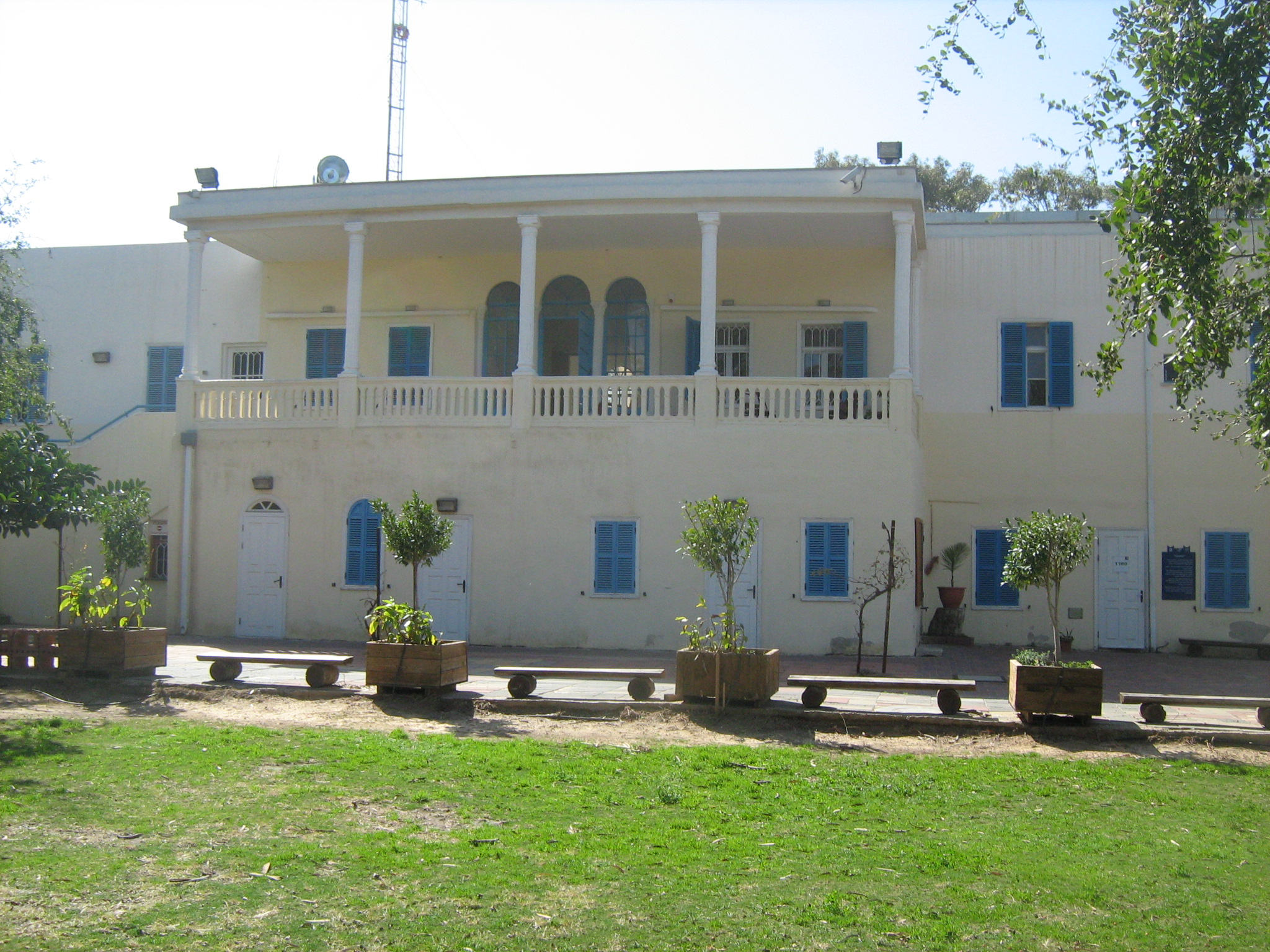 ניצנים